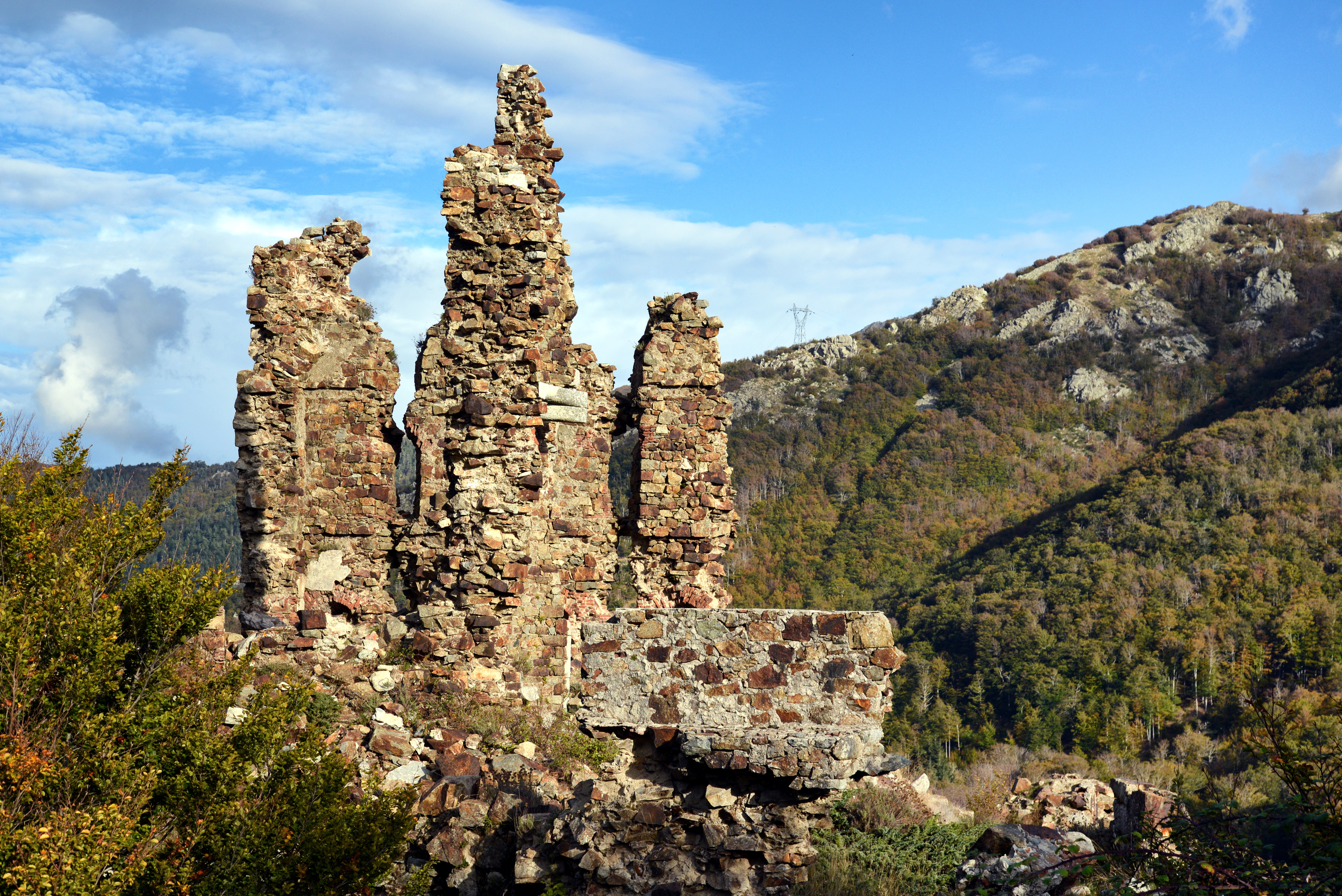 Vivario, Centre Corse - Ruines du fort De Vaux au col de Vizzavona